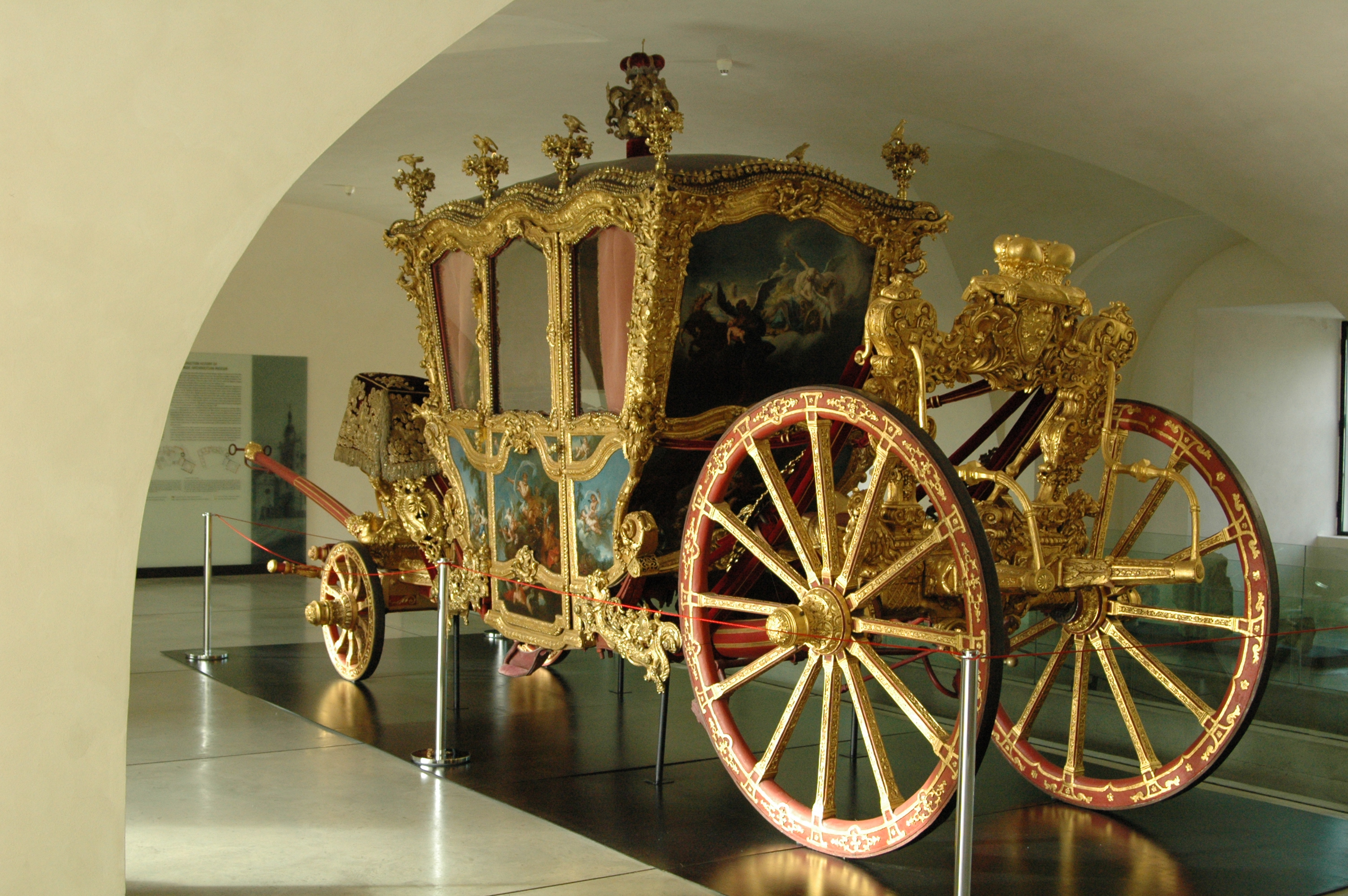 Jeden z exponátů Muzea při chrámu sv. Václava v Olomouci, 2010